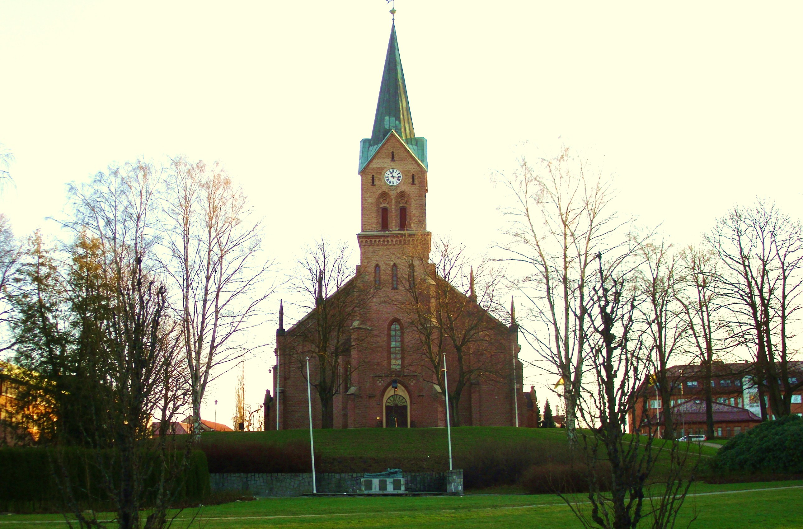 Lutheranische Stadtkirche von Sarpsborg, 1862 im neugotischen Stil erbaut